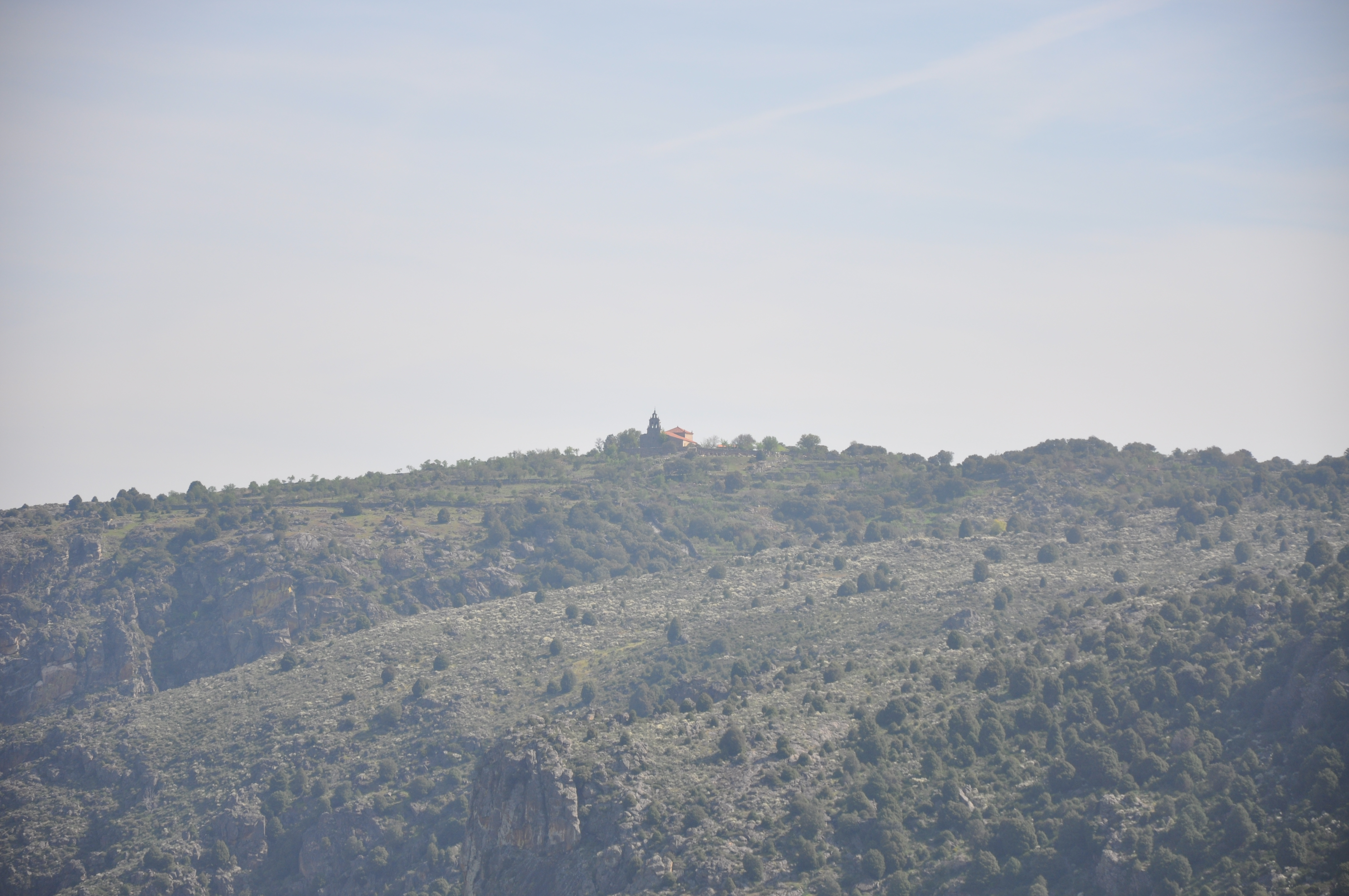 Ermita de la Virgen de Nuestra Sra. del Castillo Fariza (Zamora, España), vista desde el Mirador de Freixiosa en Portugal.